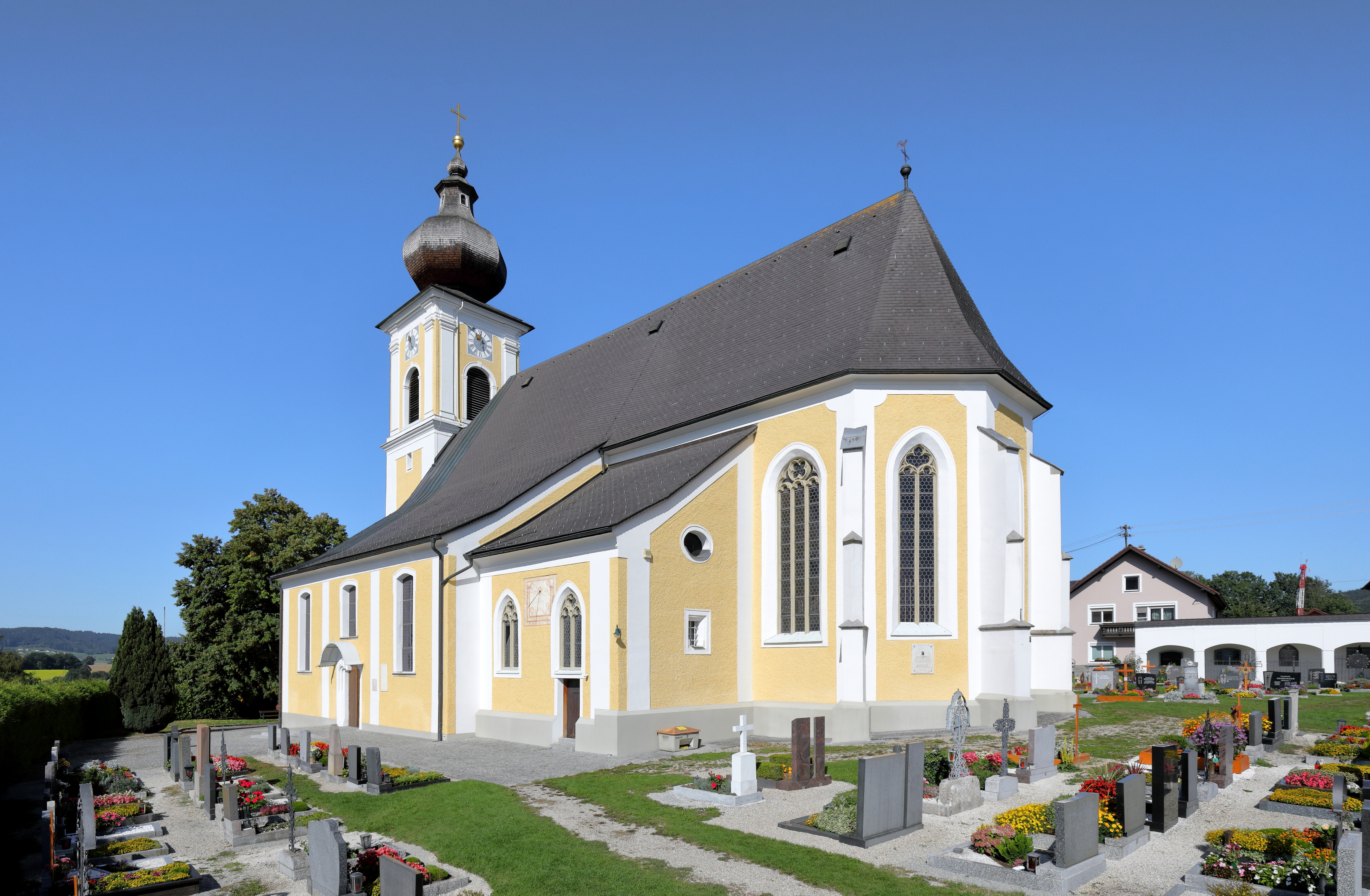 Ostansicht der röm.-kath. Pfarrkirche hl. Stephan in der oberösterreichischen Marktgemeinde Ottnang am Hausruck.Die von einem Friedhof umgebene Kirche wurde ursprünglich im 13. Jahrhundert im gotischen Stil erbaut. Anfang des 18. Jahrhunderts wurde sie unter Carlo Antonio Carlone zur jetzigen dreischiffigen Form umgebaut und erweitert.